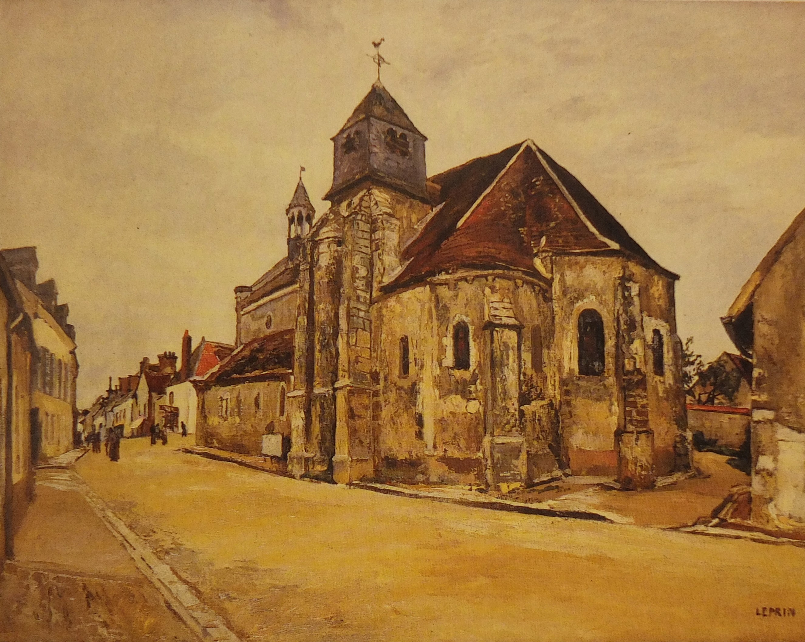 L'église de Bléneautitle QS:P1476,fr:"L'église de Bléneau" label QS:Lfr,"L'église de Bléneau"